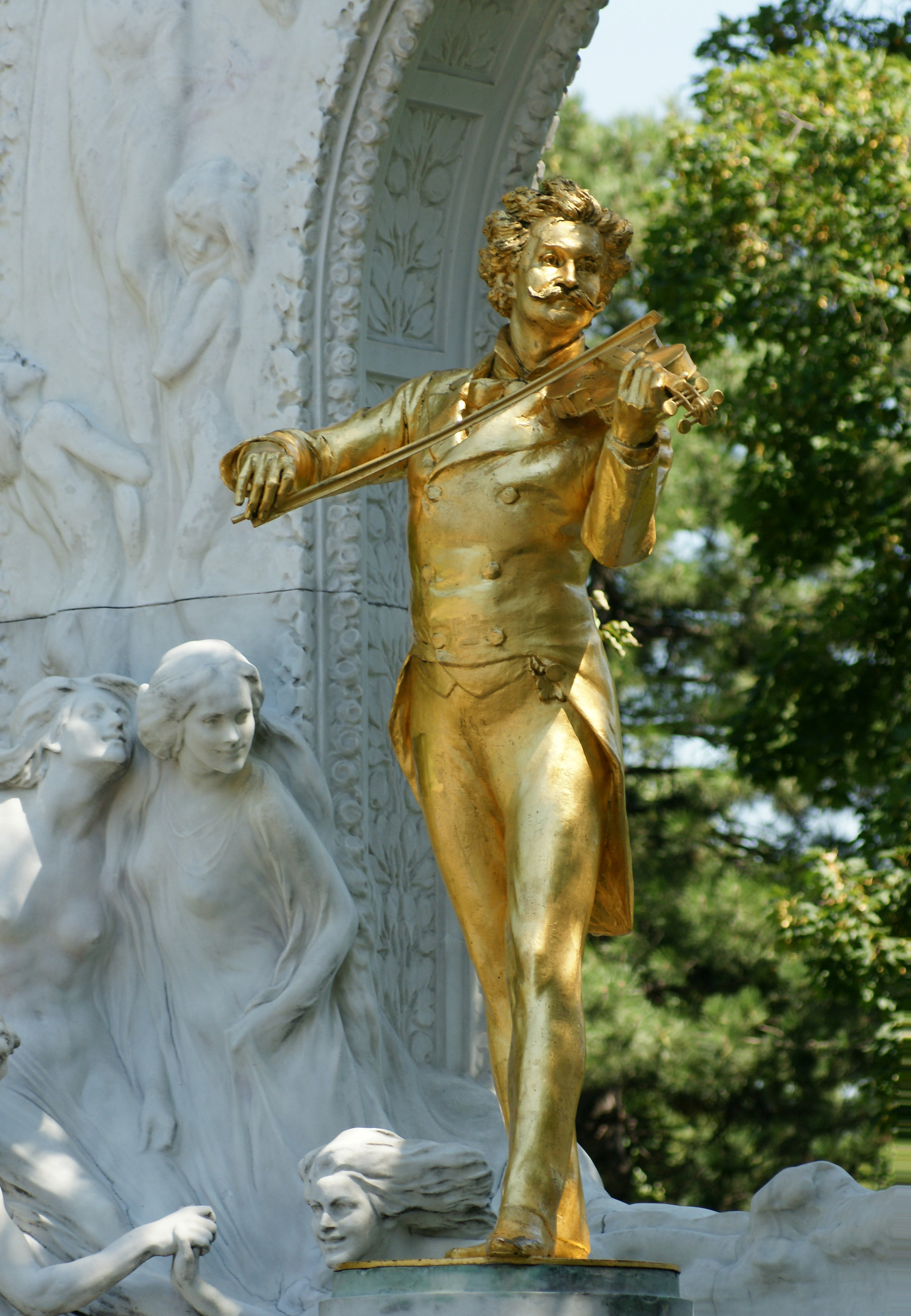 Das Johann Strauß (Sohn) Denkmal von Edmund Hellmer von 1921, im Wiener Stadtparks in Wien. Zu erreichen mit der U4 Stadtpark (U-Bahn-Station), deren Station von Otto Wagner gebaut wurde.